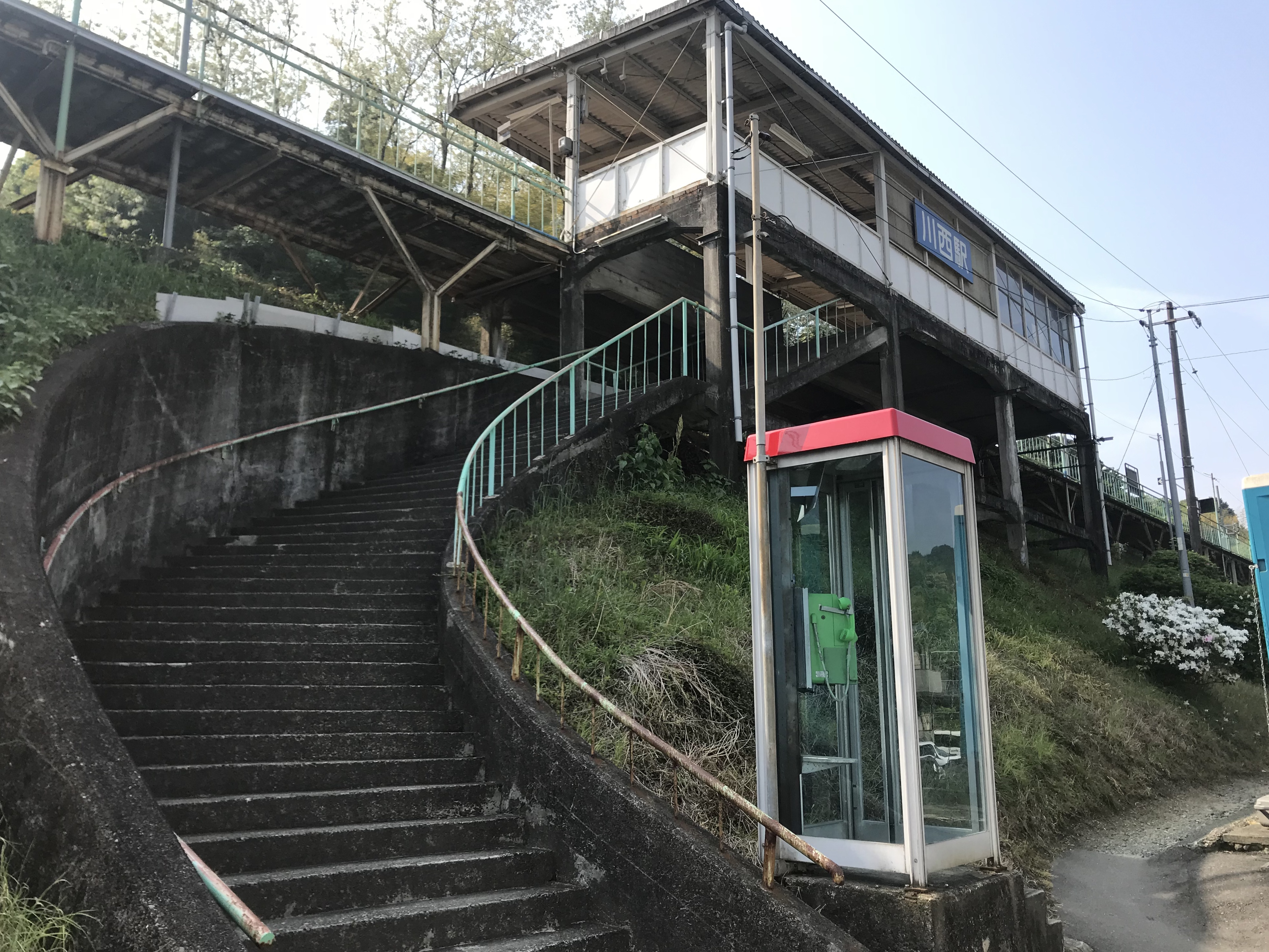 川西駅の駅舎と階段